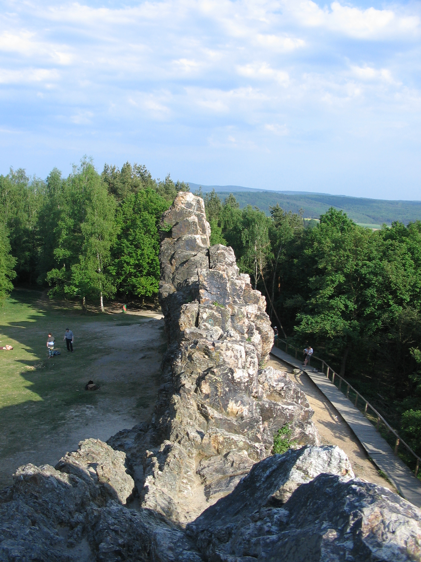 Eschbacher Klippen bei Usingen-Eschbach.